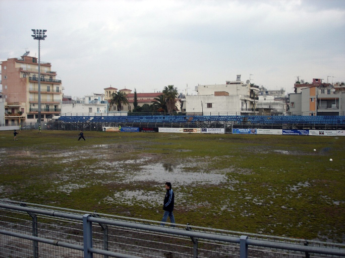 Prosfigika Groud in Patras Γήπεδο Προσφυγικών Πάτρας